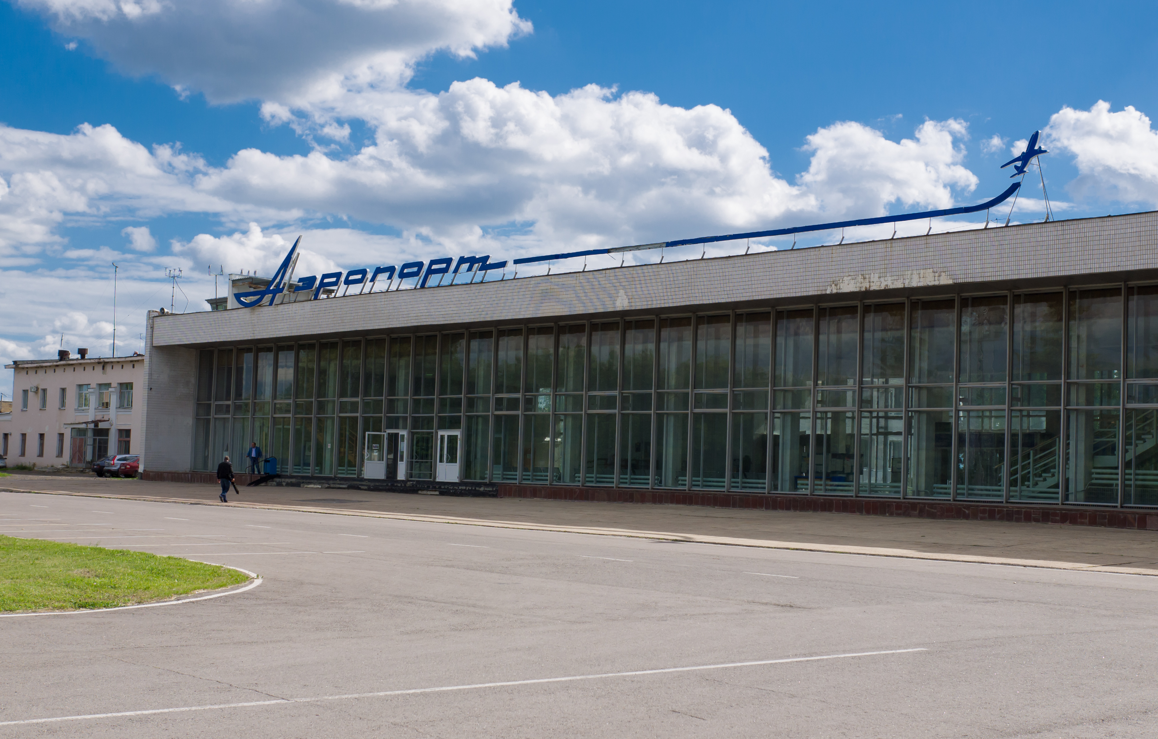 Аэропорт Донское, г.Тамбов, Россия